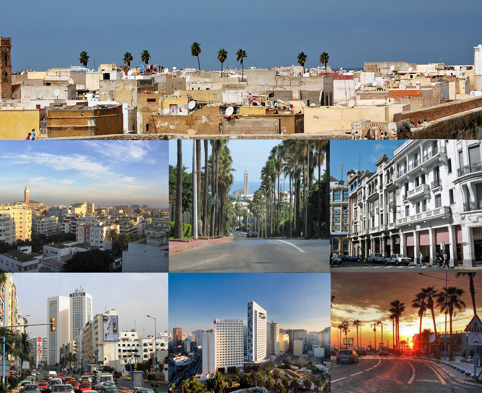 Pêlemêle de Casablanca créé à partir de photographies de Wikimédia Commons.